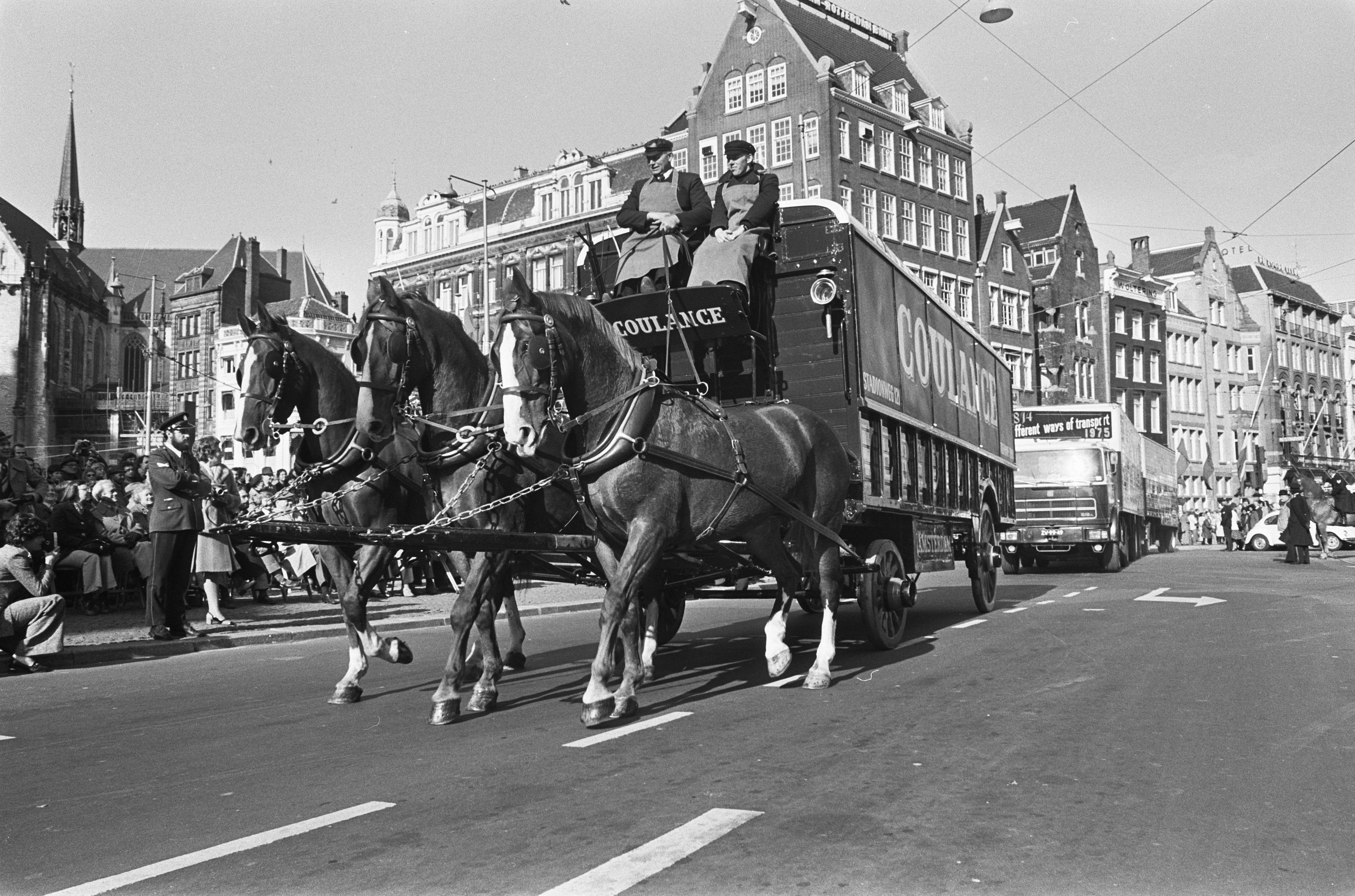 Collectie / Archief : Fotocollectie Anefo Reportage / Serie : [ onbekend ] Beschrijving : "Contrasten in Vervoer" georganiseerd door "Stichting Paard en Koets" in Amsterdam; verhuiswagen met drie paarden op Dam Datum : 12 oktober 1975 Locatie : Amsterdam, Noord-Holland Fotograaf : Croes, Rob C. / Anefo Auteursrechthebbende : Nationaal Archief Materiaalsoort : Negatief (zwart/wit) Nummer archiefinventaris : bekijk toegang 2.24.01.05 Bestanddeelnummer : 928-2011